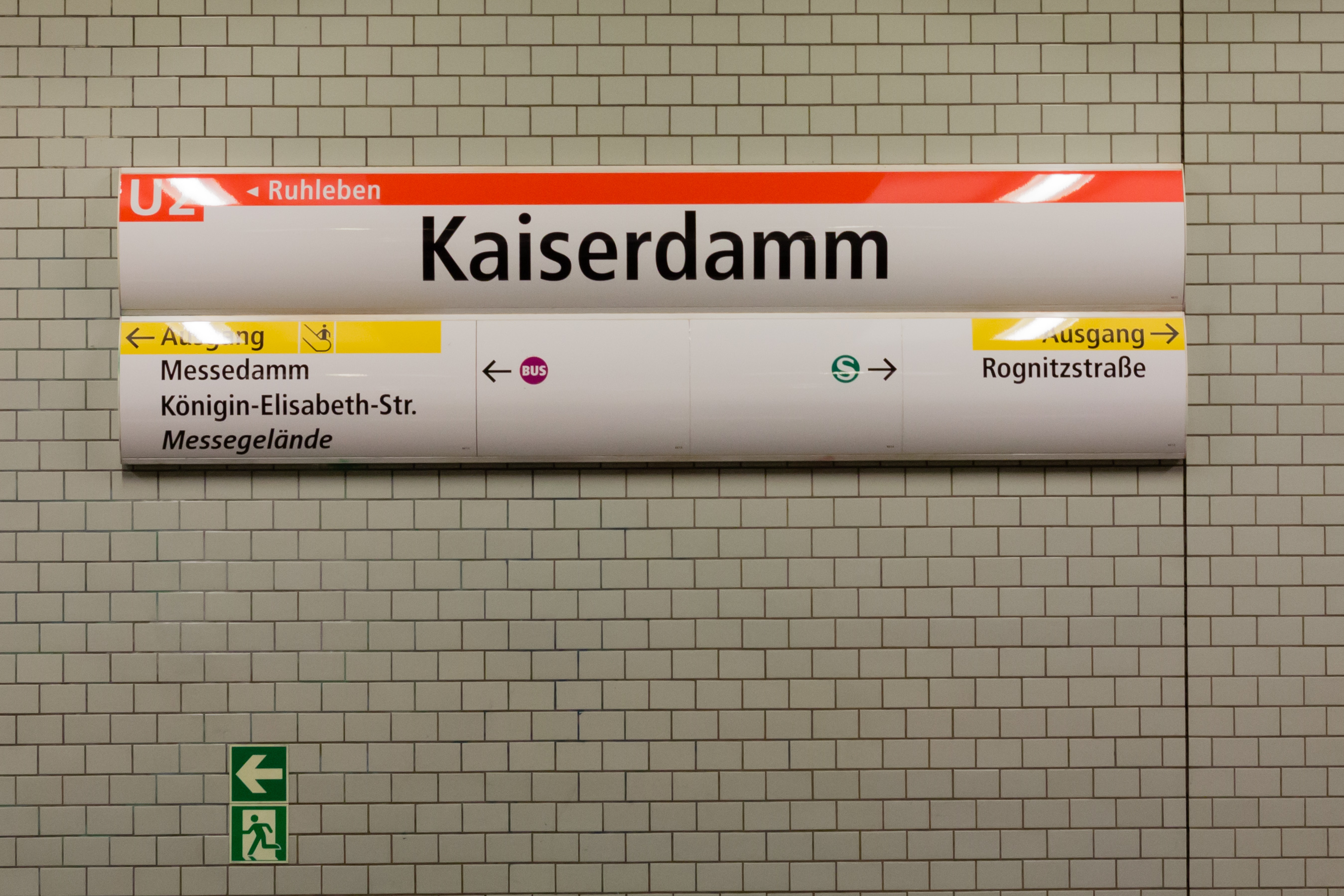 U-Bahnhof Kaiserdamm, Stationsschild